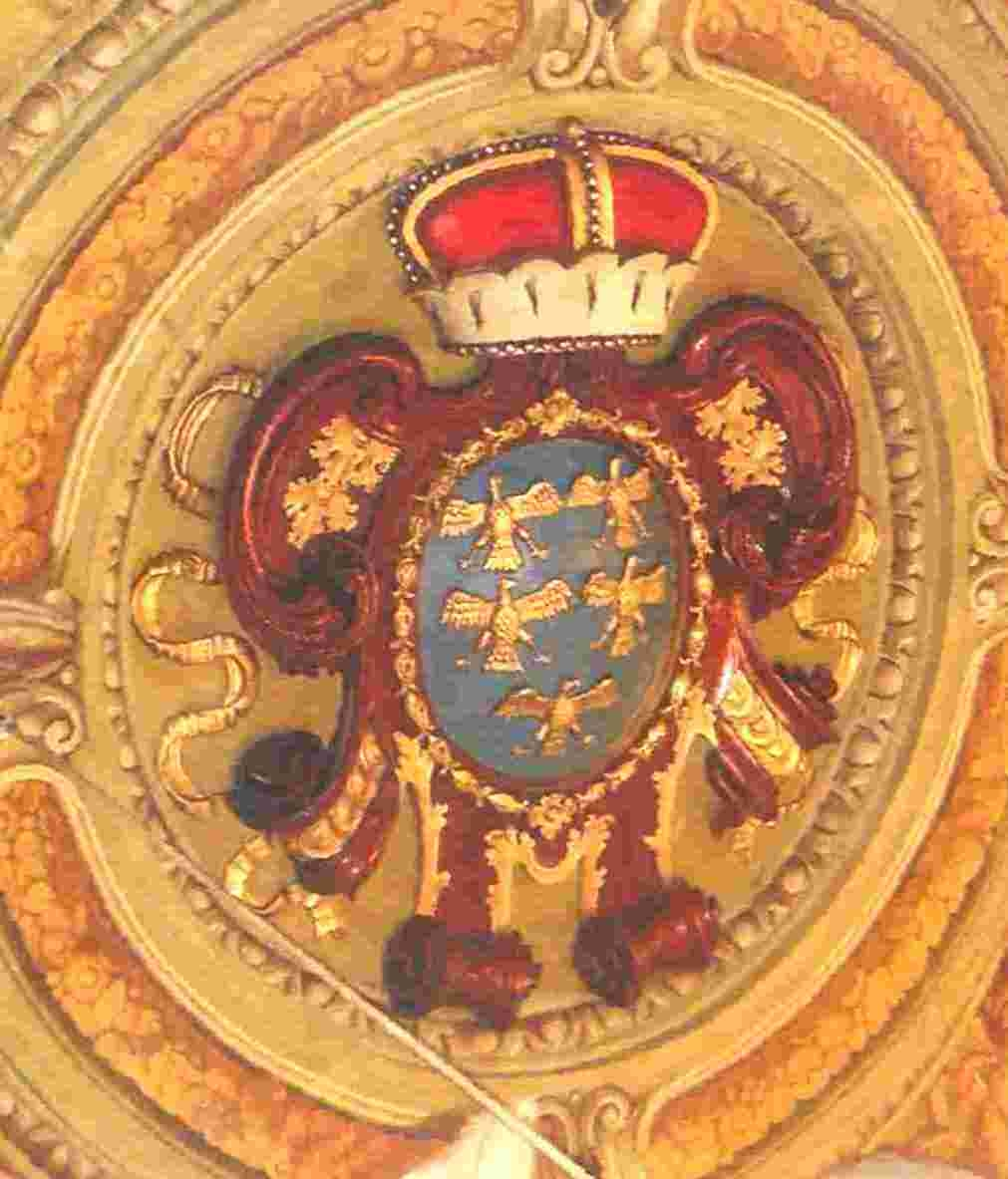 Palais_Niederösterreich3